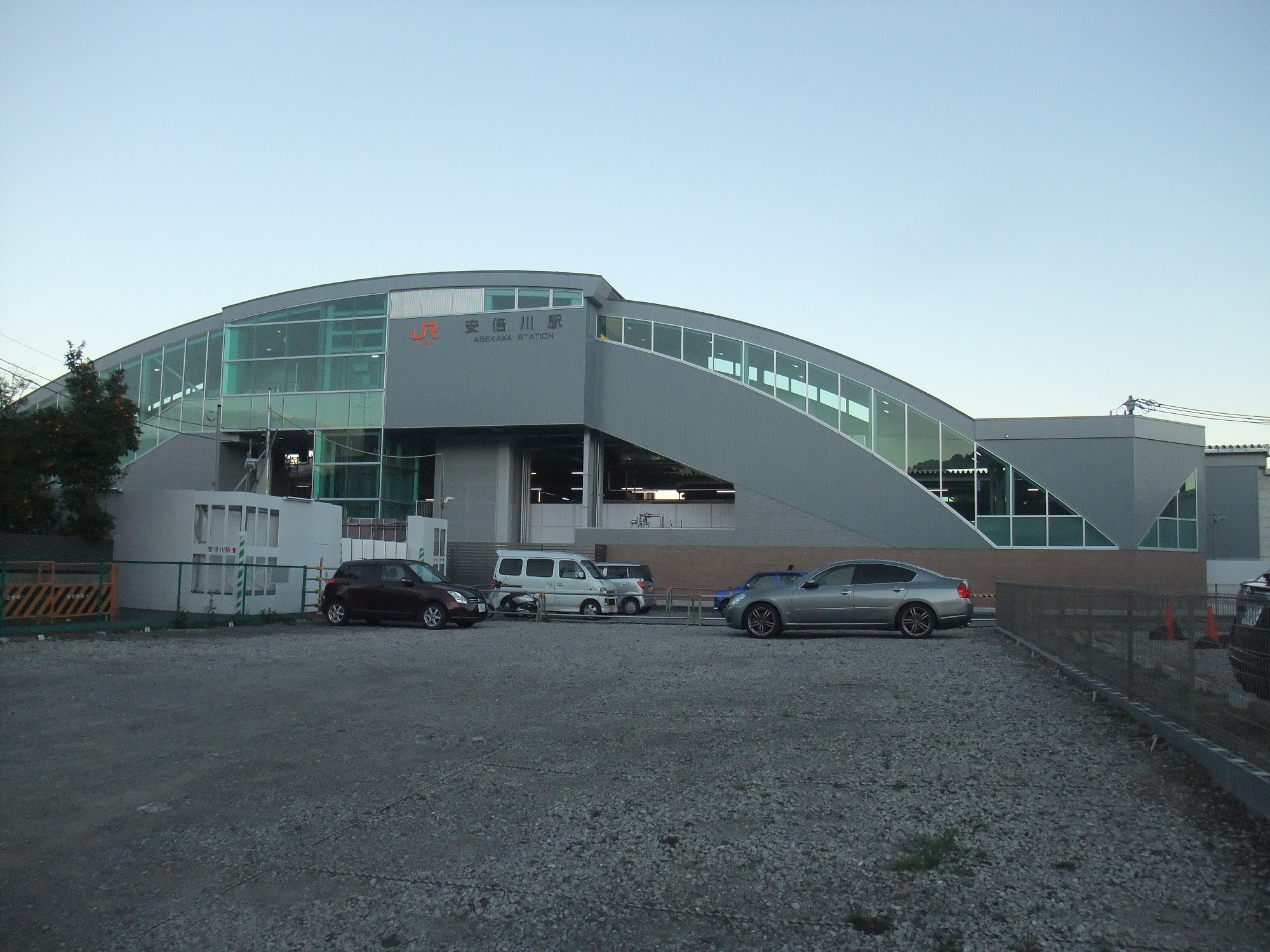 東海道本線安倍川駅